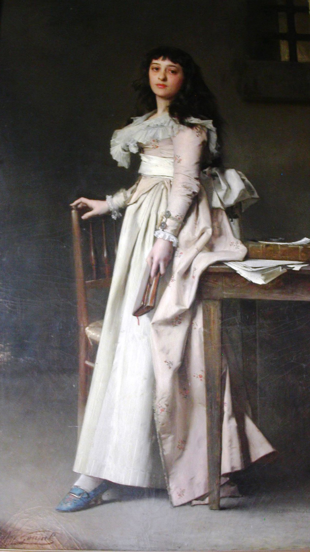 Manon Roland en prison. Huile sur toile de Jules-Adolphe Goupil, salon de 1880.